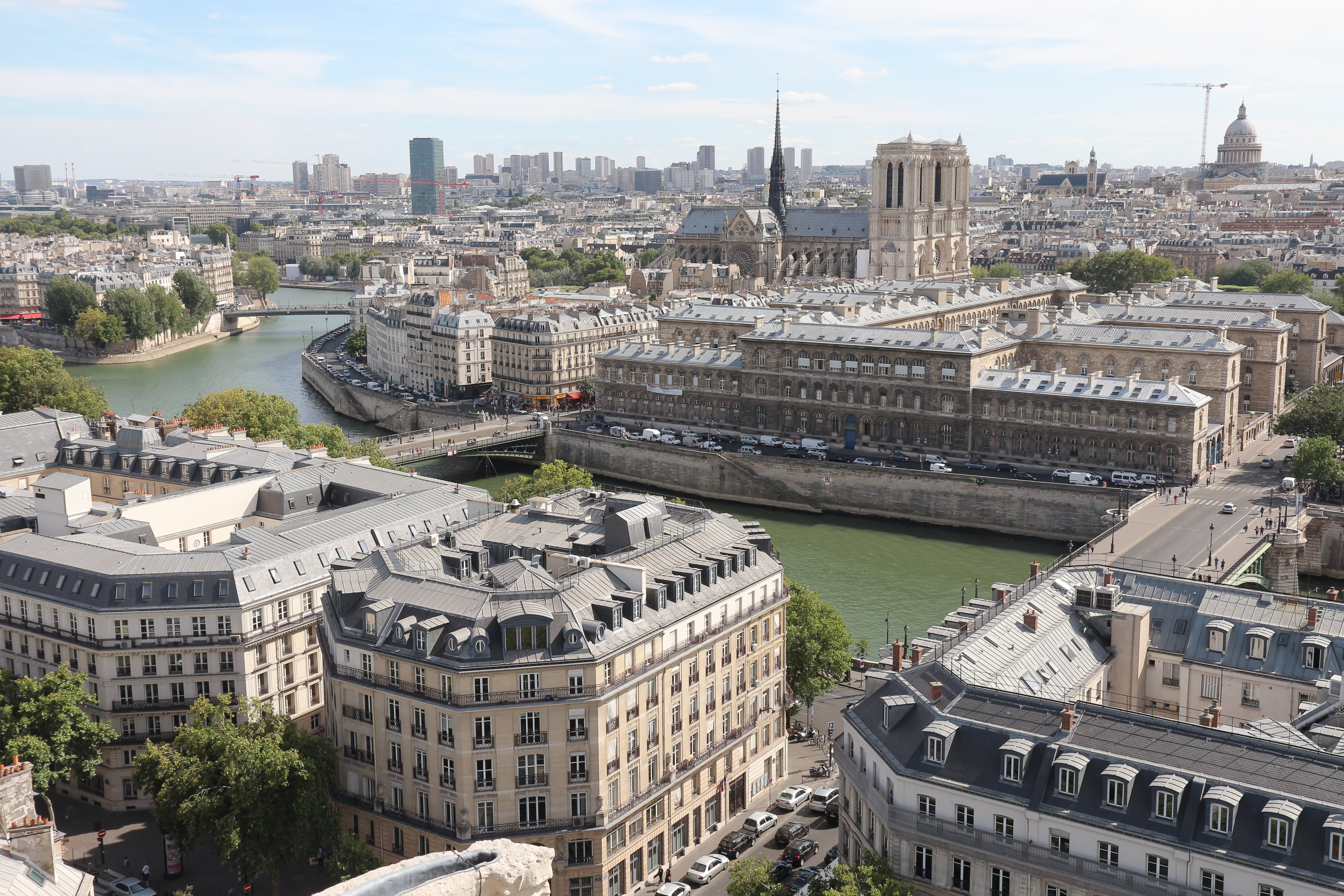 Panorama depuis le sommet de la tour Saint-Jacques: La Seine, île Saint-Louis, pont Saint-Louis, île de la Cité et cathédrale Notre-Dame